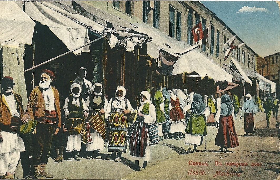 Jour de marché à Skopje (Macédoine) avant 1919